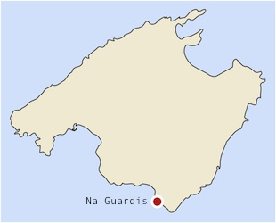 Jaciment arqueològic de l'illot de na Guardis, a prop de la Colònia de Sant Jordi, Mallorca